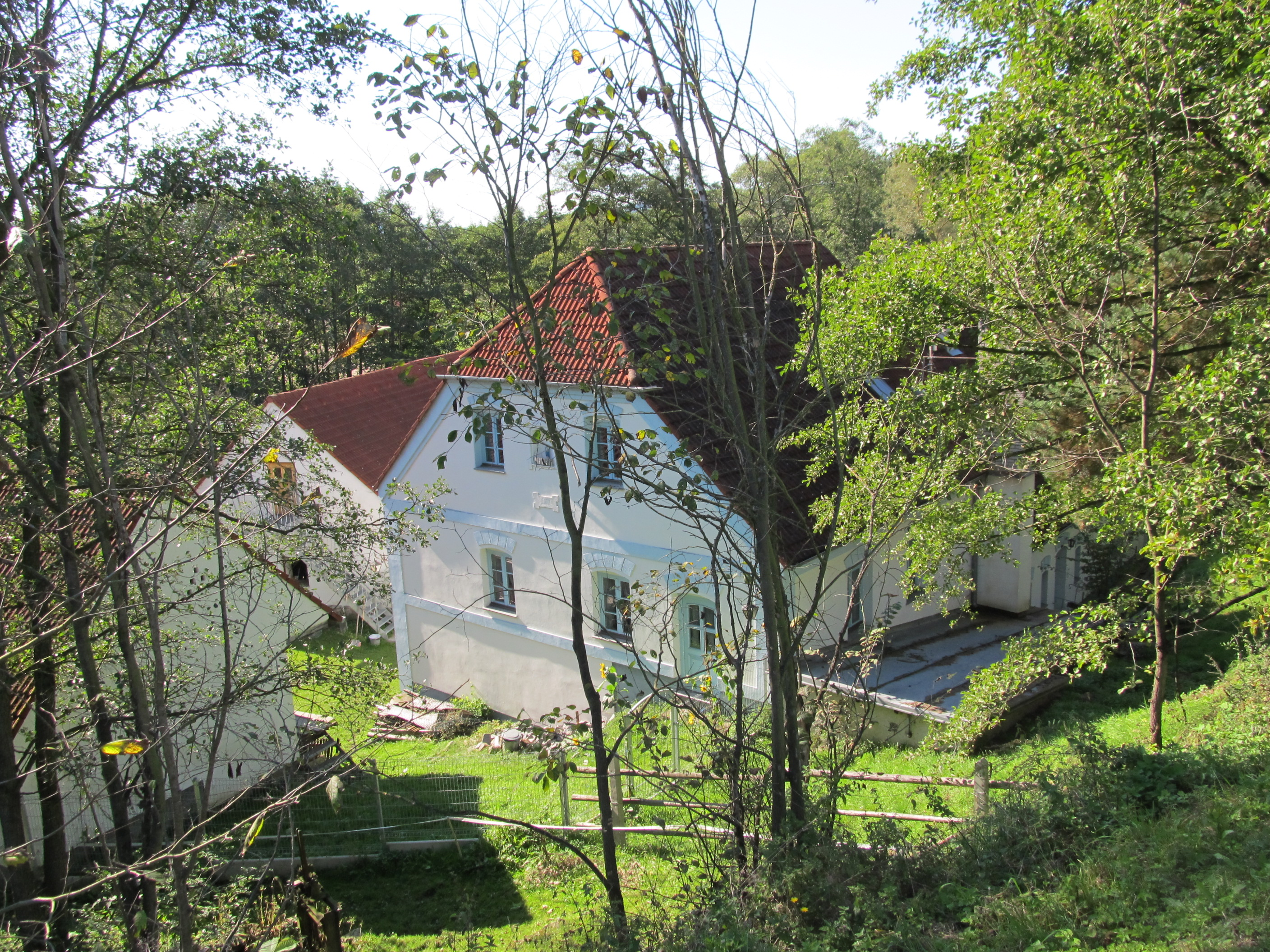 Dražovický mlýn